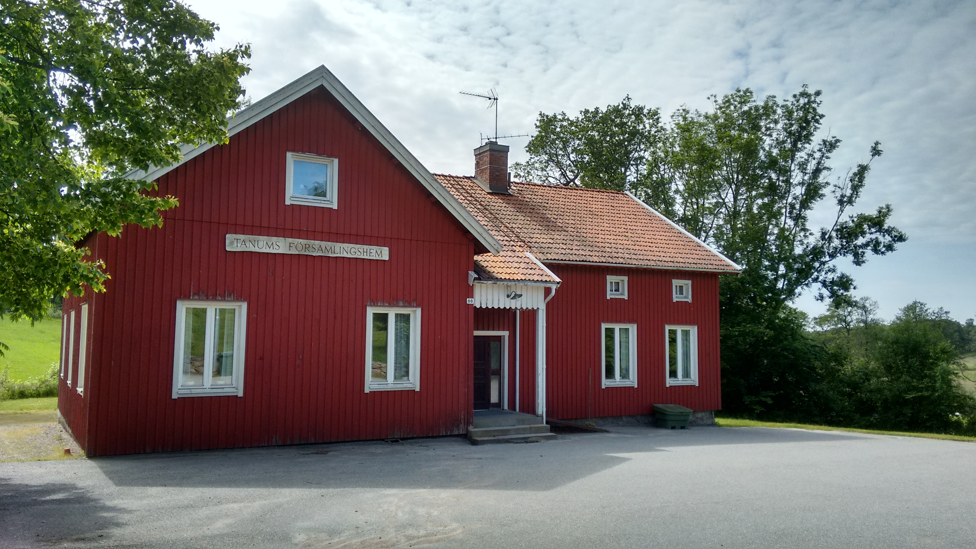 Tanums församlingshem, tidigare ortens första skola. Byggnaden uppfördes 1872 på Tanums prästgårds mark.